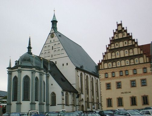 Der Dom St. Marien mit Stadt- und Bergbaumuseum am Untermarkt